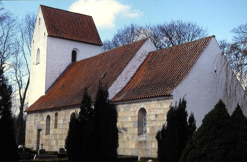 Bigum Kirke